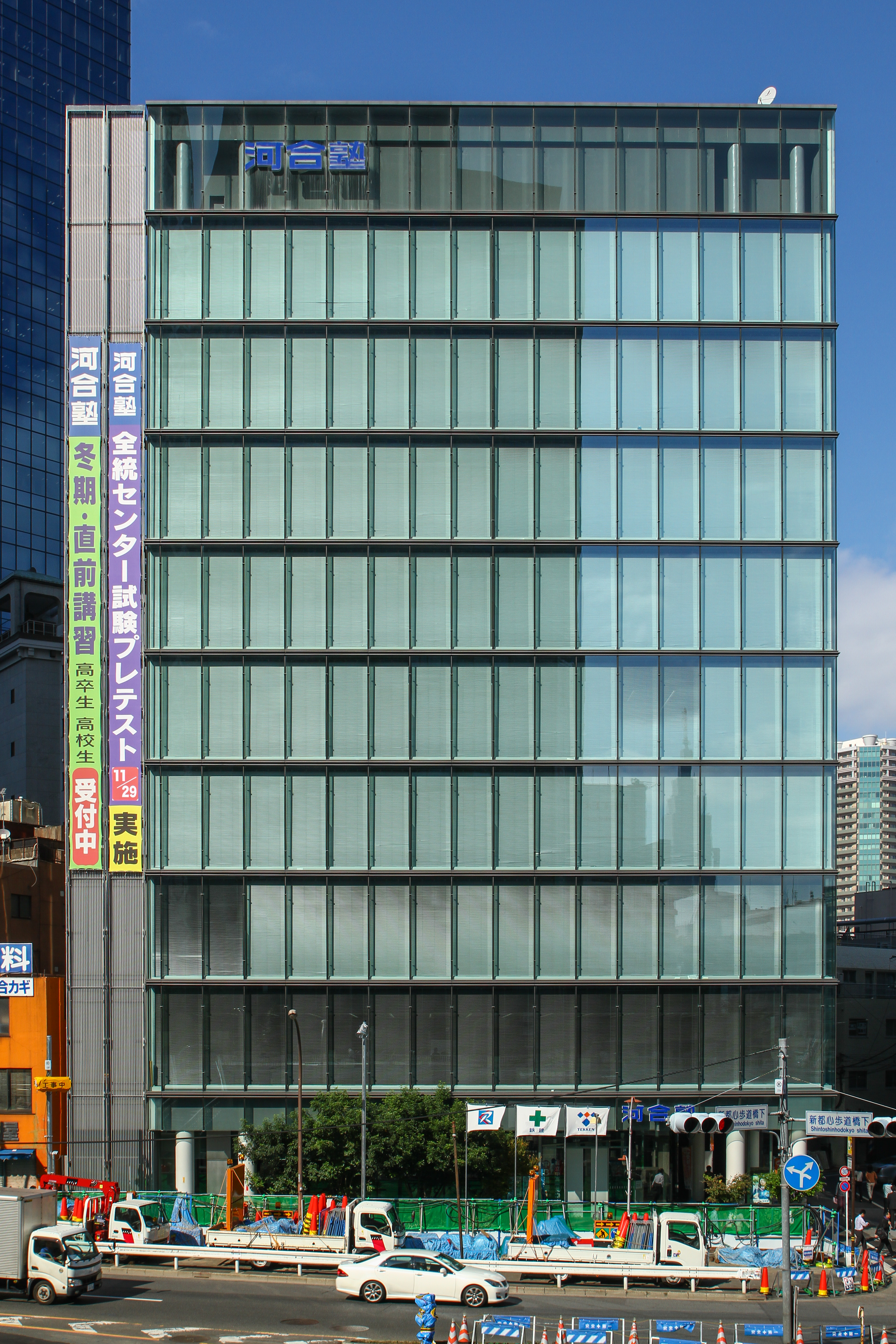 河合塾 新宿校